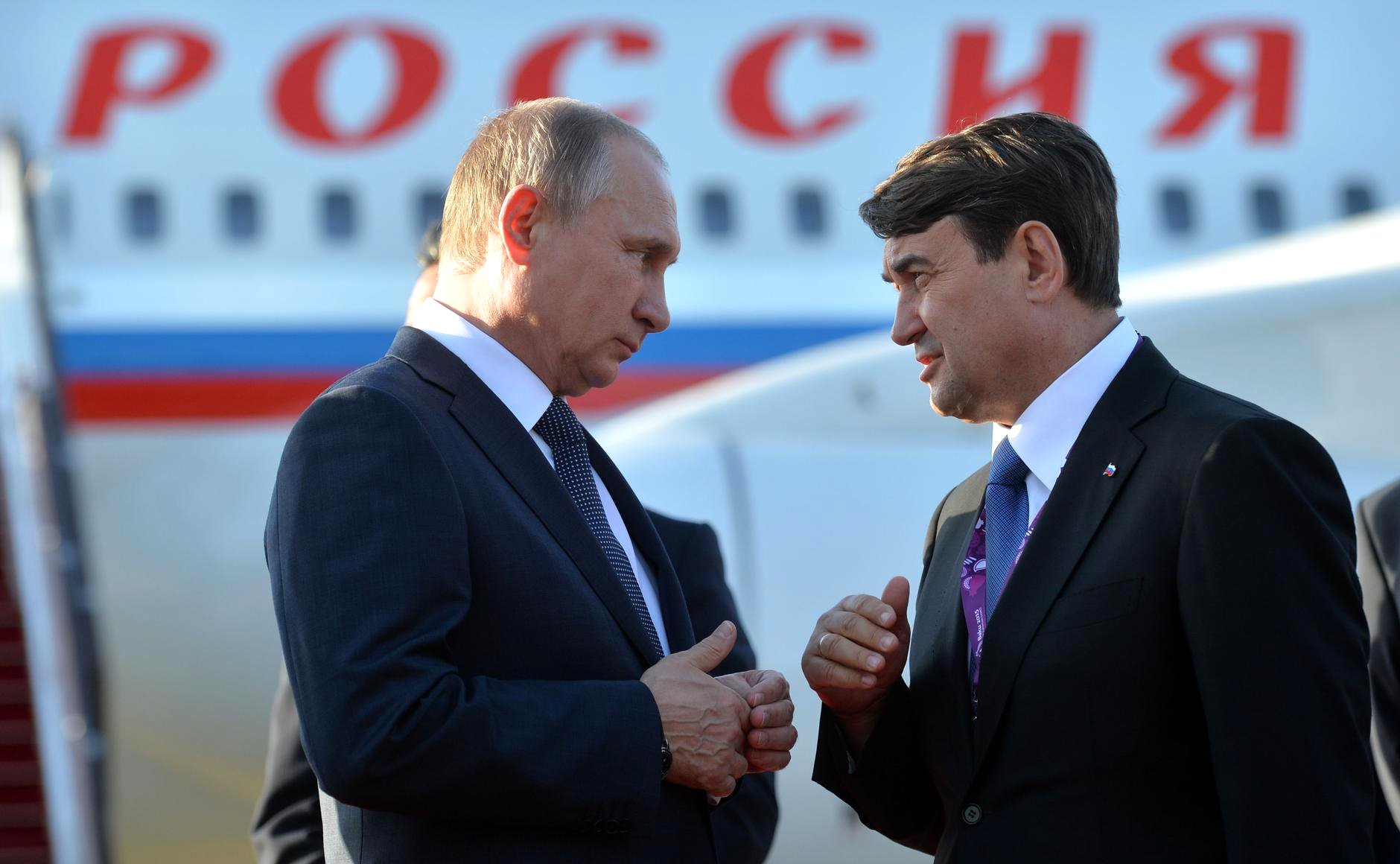 Прибытие Президента России Владимира Путина в Баку на церемонию открытия Первых Европейских игр. С помощником Игорем Левитиным